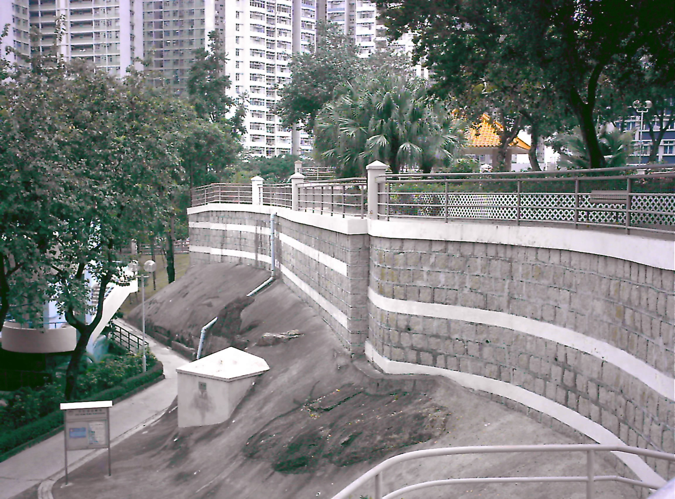 中文（香港）: 啟德遊樂場的遺跡